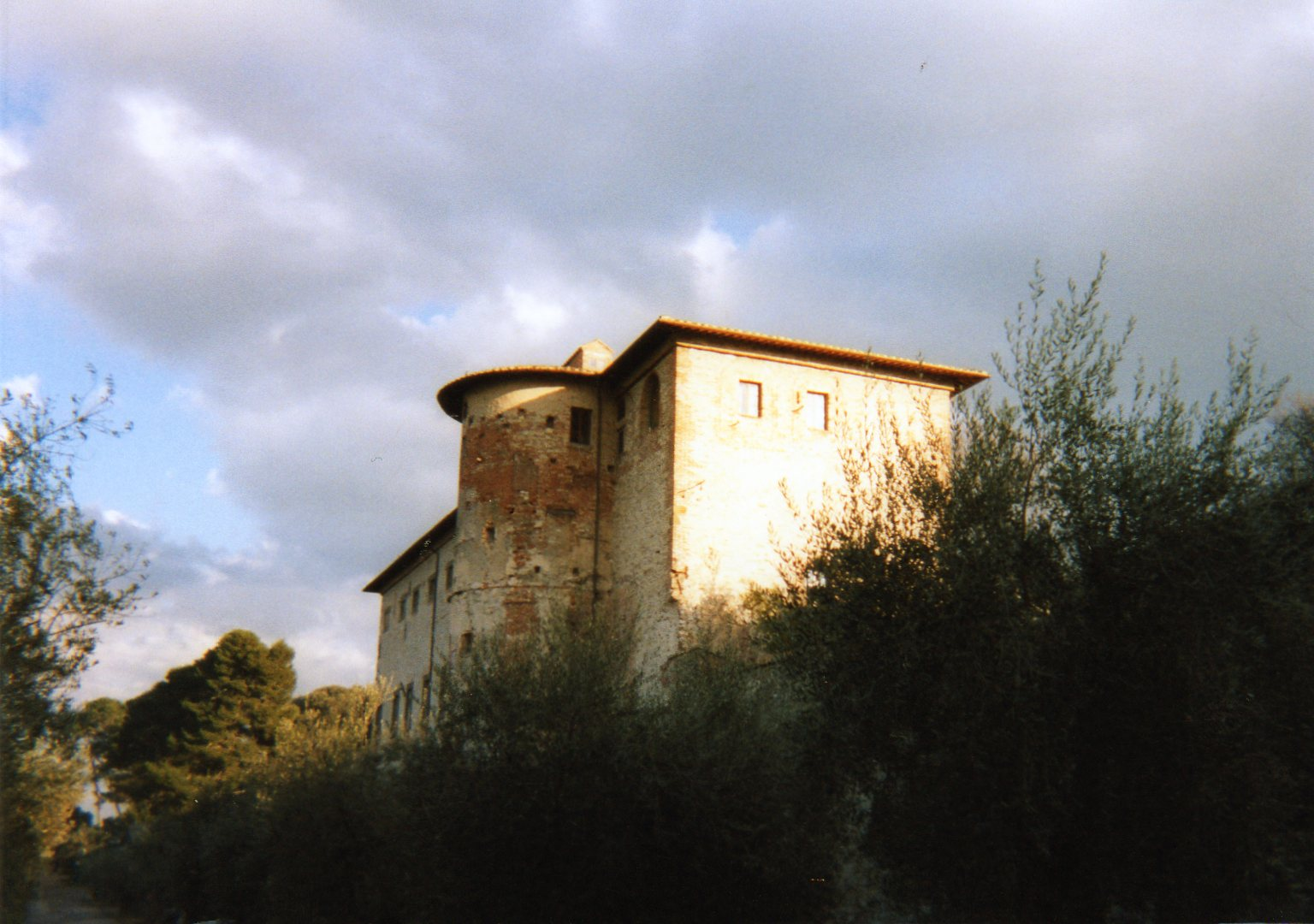 descrizione = Palazzo Ducale della Corgna, a Castiglione del Lago (PG); fonte = ho scattato io la foto; data = 21.03.2013; autore = Eleonora3 licenza = vedasi sotto; detentore copyright = vedasi sotto